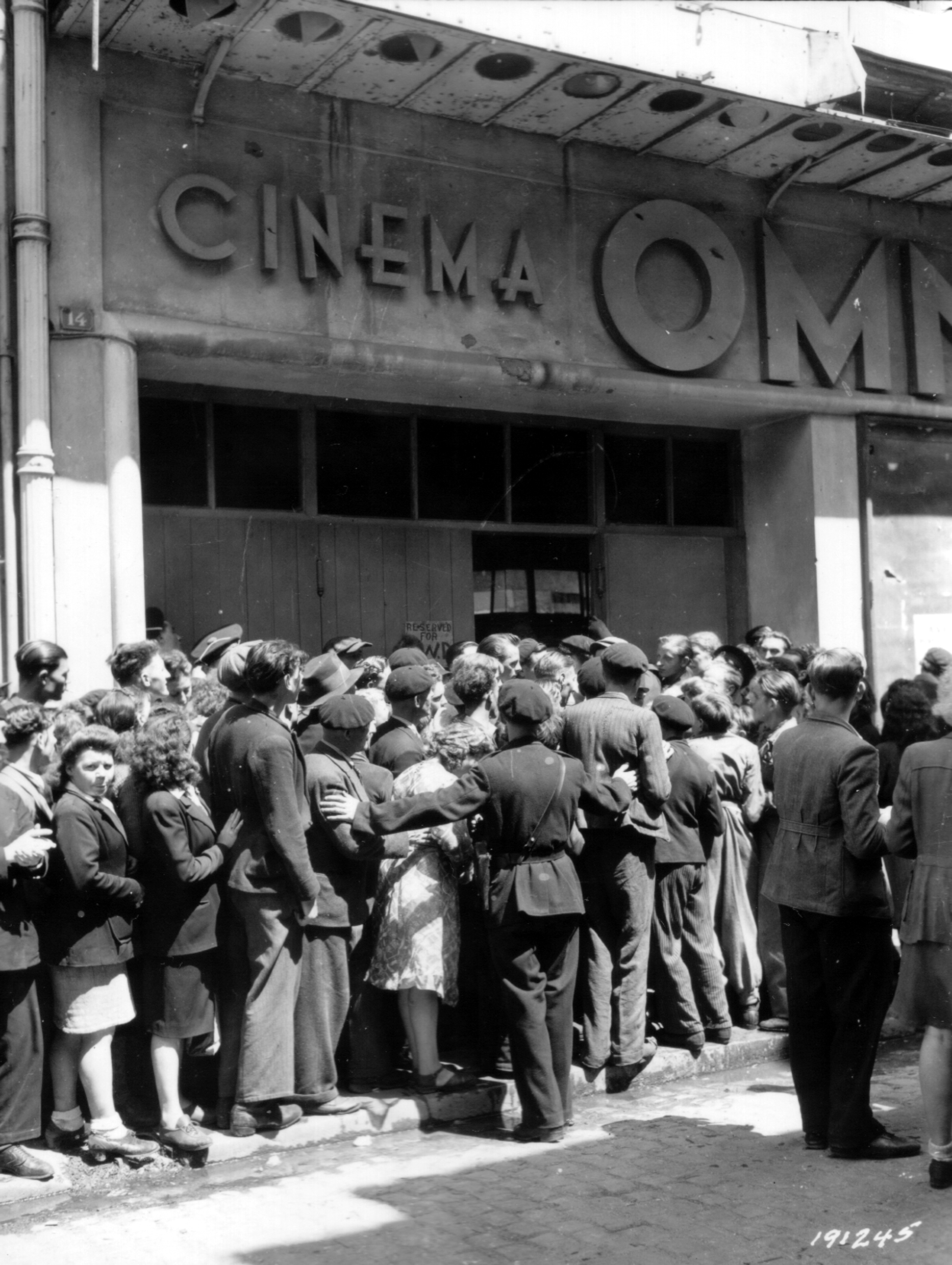 Une file d'attente de civils se presse devant un cinéma, un policier maintient la foule sur le trottoir. Ce cinéma, l'OMNIA se trouve rue de la Paix, derrière l'Hôtel de Ville, le bâtiment existe encore aujourd'hui comme Centre Culturel. La tenue du policier ou milicien est bizarre, il est armé mais porte un béret au lieu d'un képi pour un agent de Police. L'Omnia programmait durant l'été 1944 un film américain tous les soirs et en matinée le samedi et le dimanche. Remarquez à gauche la tuyauterie d'écoulement des eaux pluviales, voir ici en Septembre 2007 : et ce montage